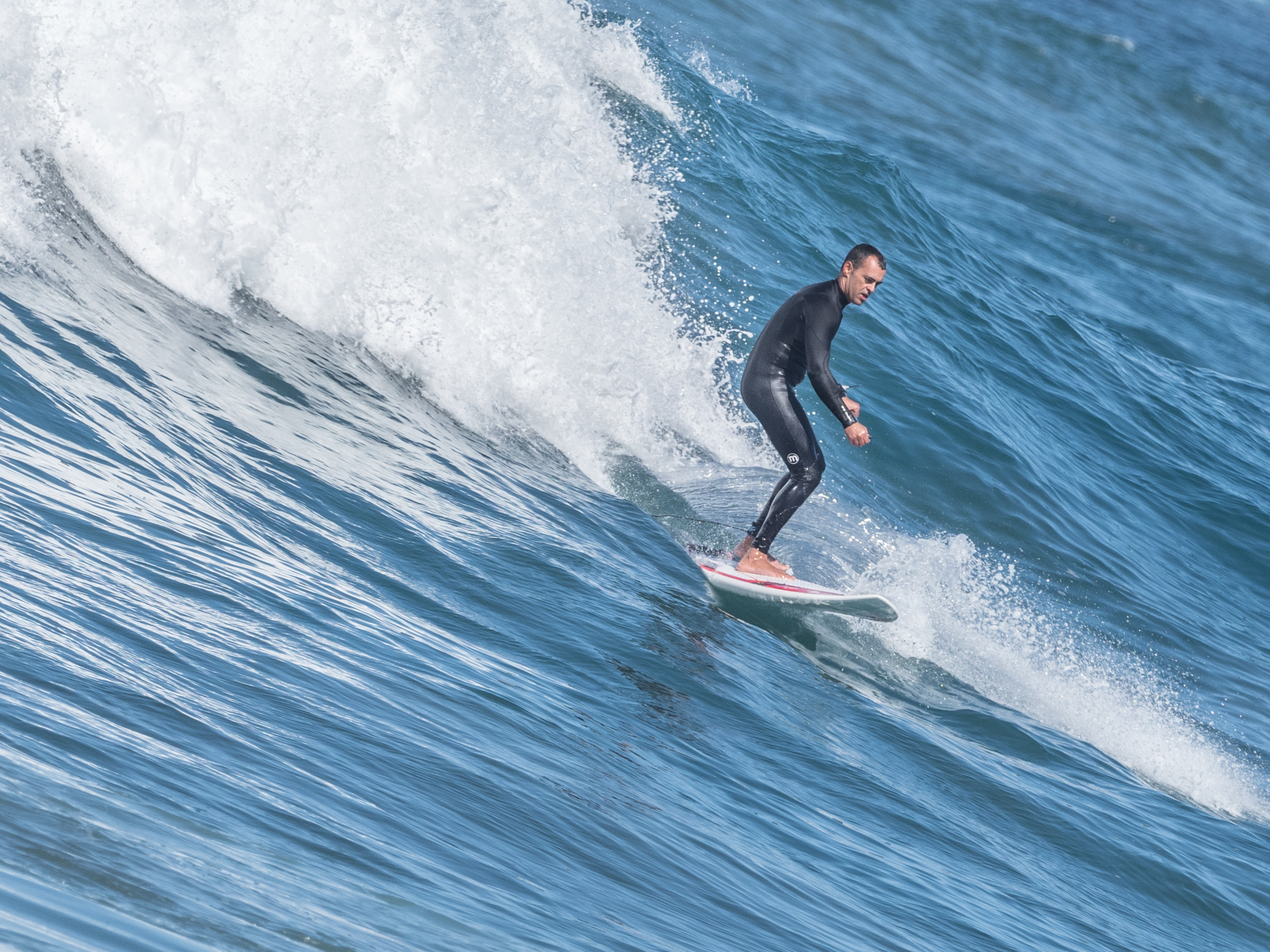 Playa de Las Canteras, Las Palmas, Gran Canaria, February 2018